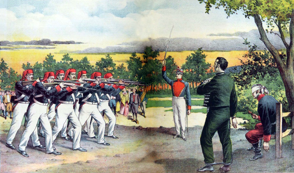 Fusilamiento del General chileno José Miguel Carrera y el Coronel Felipe Álvarez en Mendoza, 4 de septiembre de 1821.